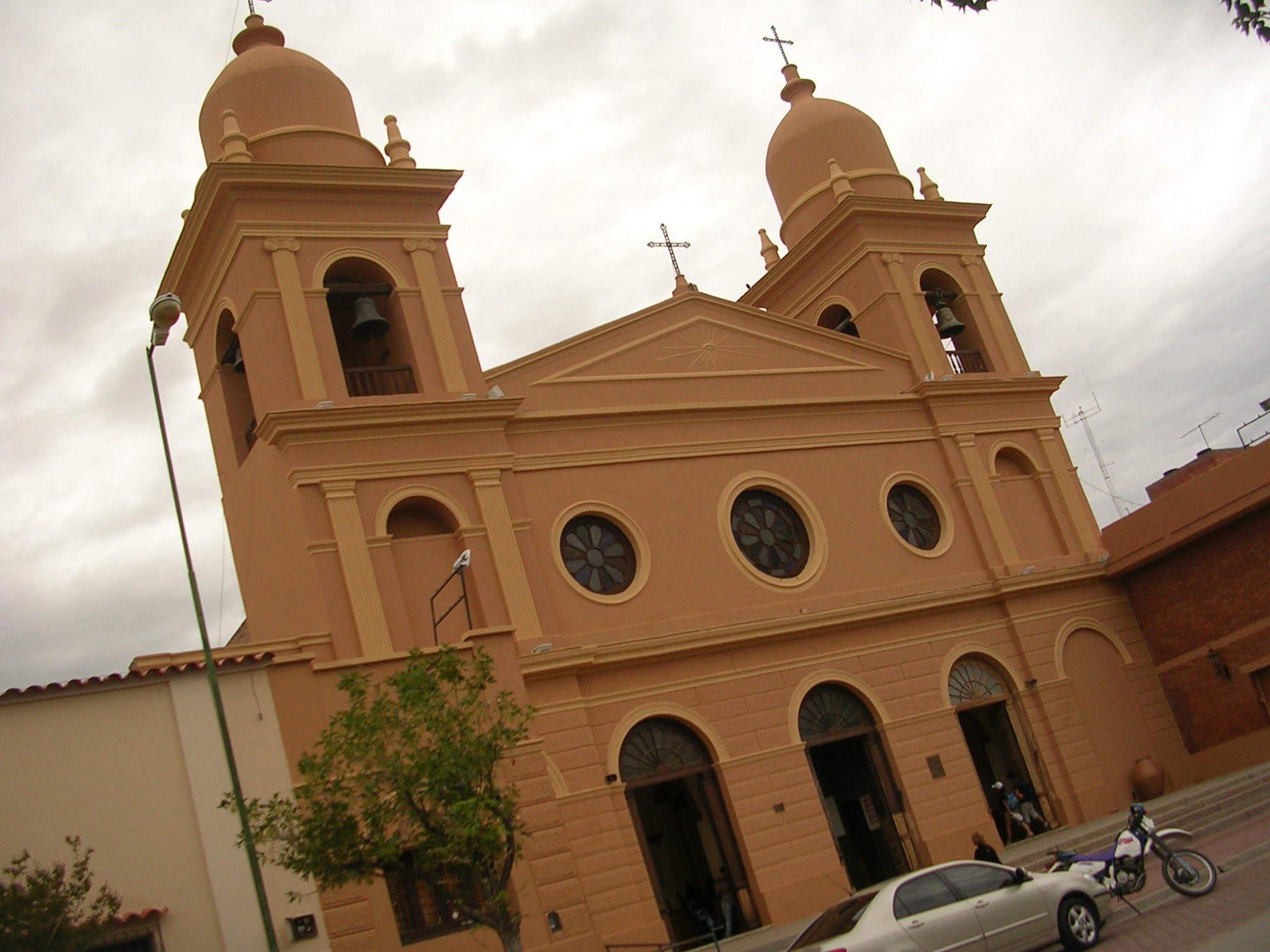 Catedral de Cafayate (Argentina)